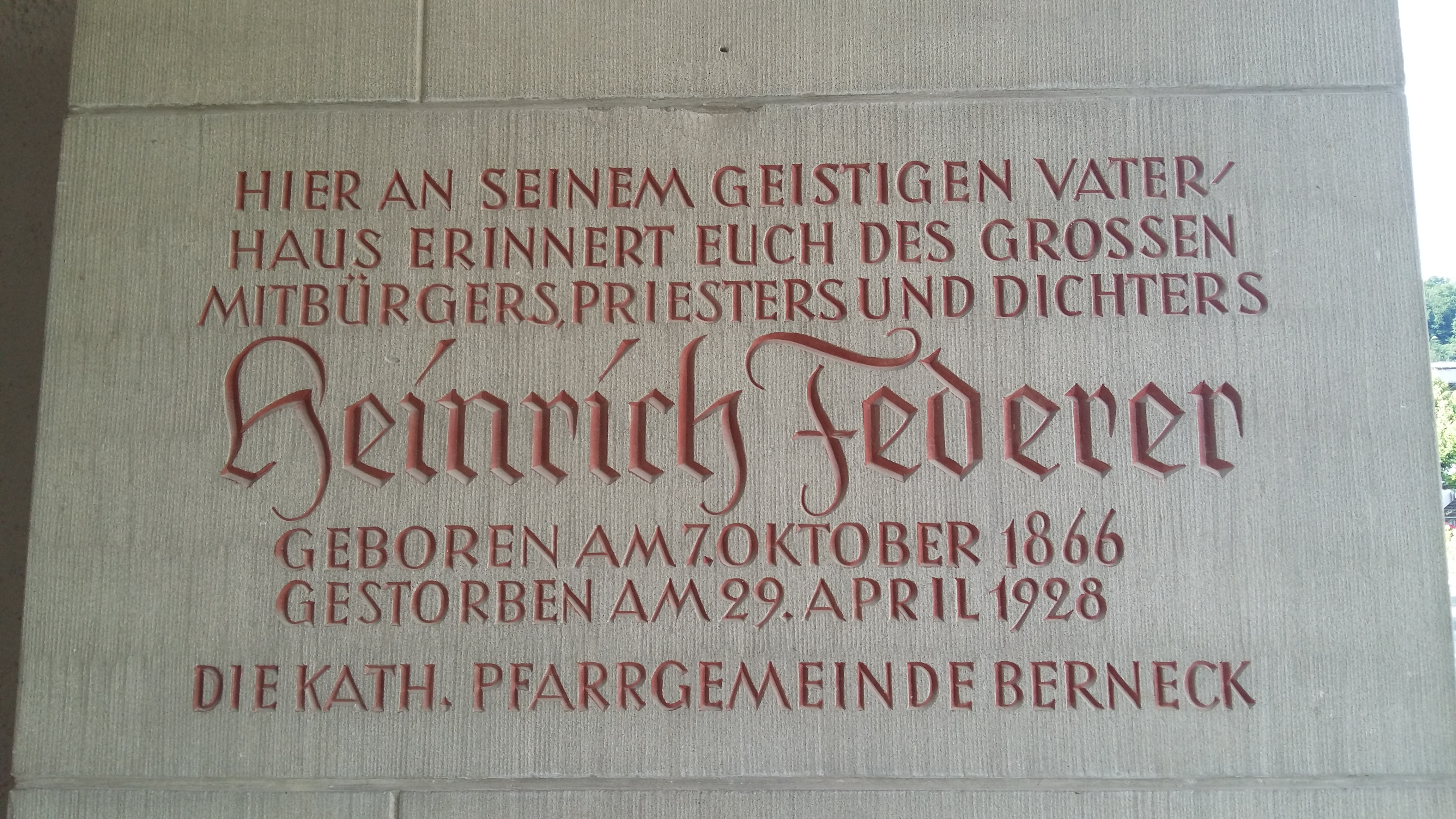 Inschrift an der Katholischen Kirche U.L.F Berneck SG. Zum gedenken an Heinrich Federer